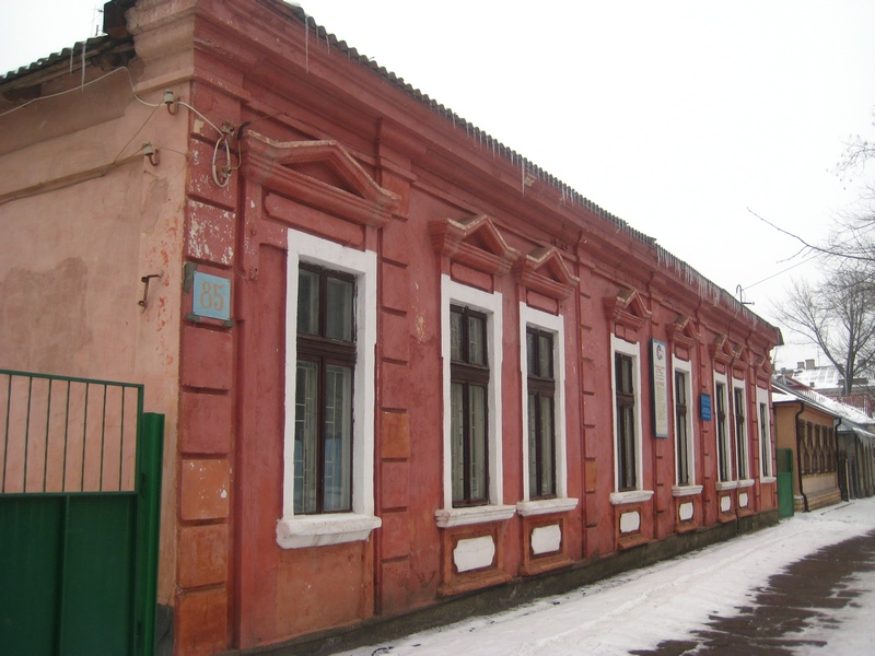 Здание бывшей синагоги текстильщиков.